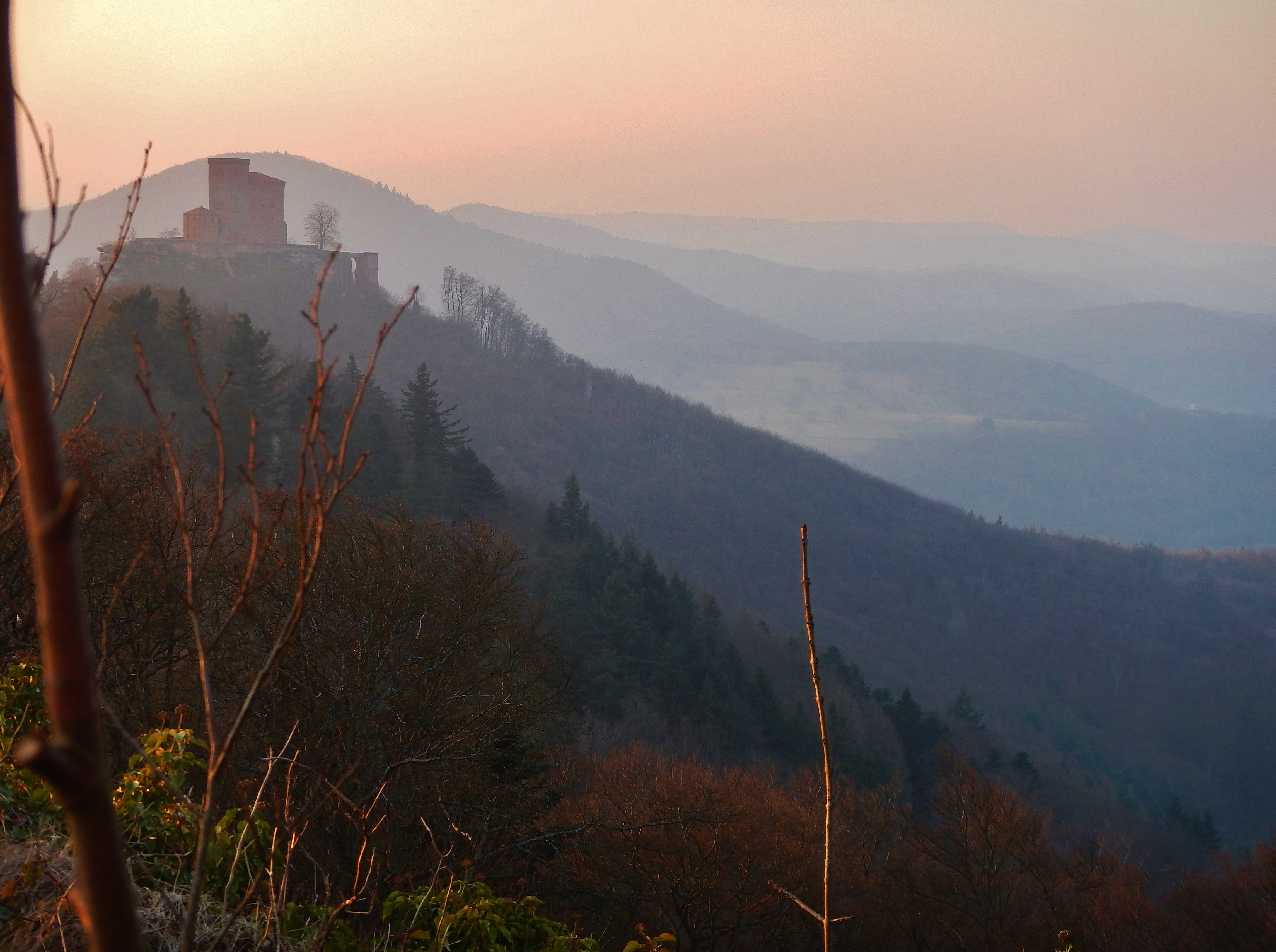 Blick zur Burg Trifels